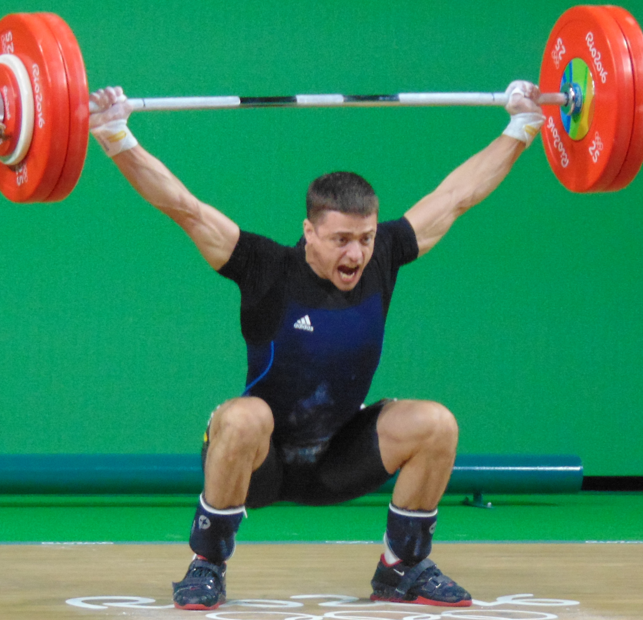 Rio 2016 - Weightlifting men's 69 kg